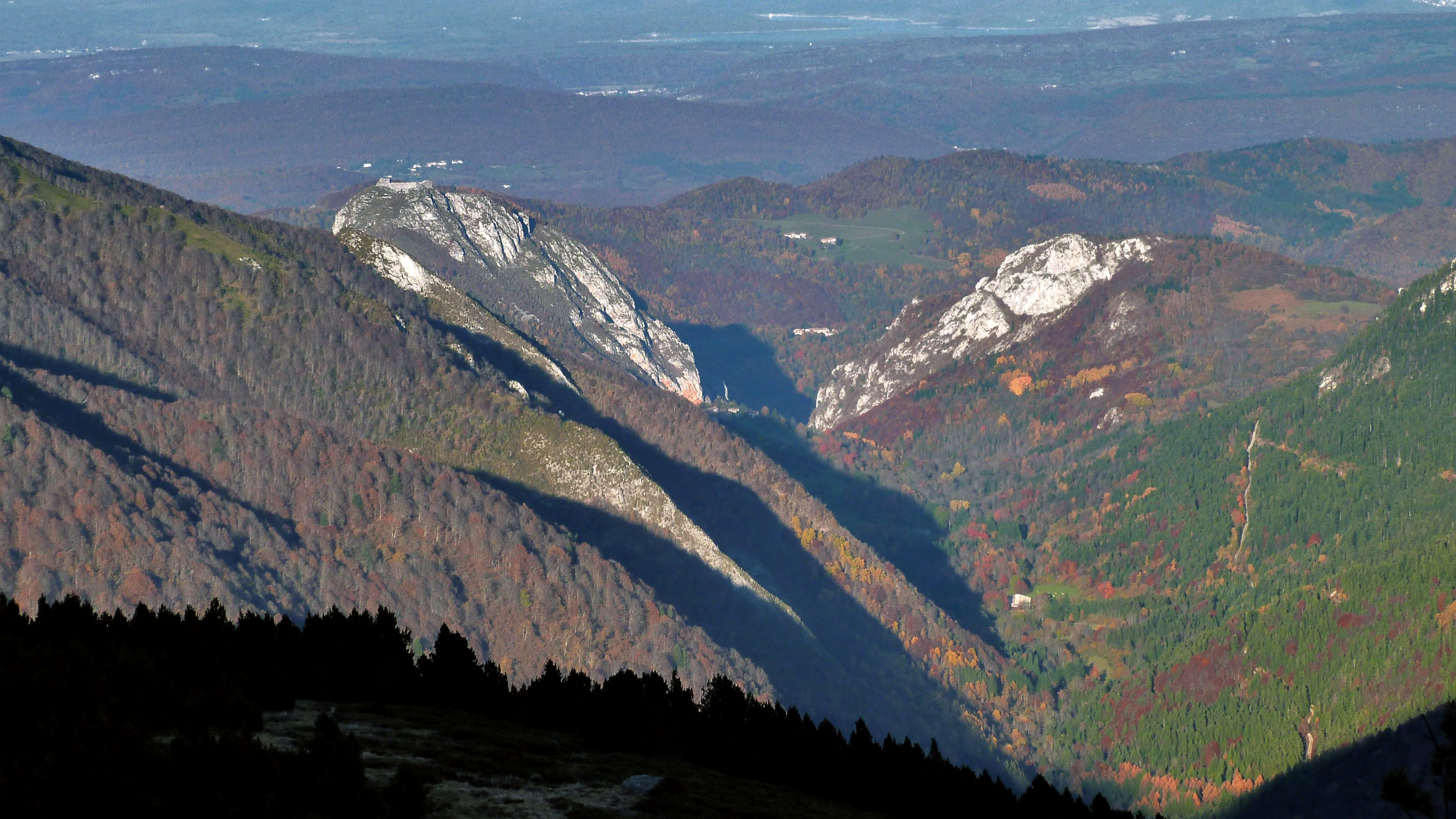 Pog du château de Montségur. Photo prise aux alentours de 2000 m d'altitude depuis un versant un versant orienté plein nord qui ne voit pas le Soleil.